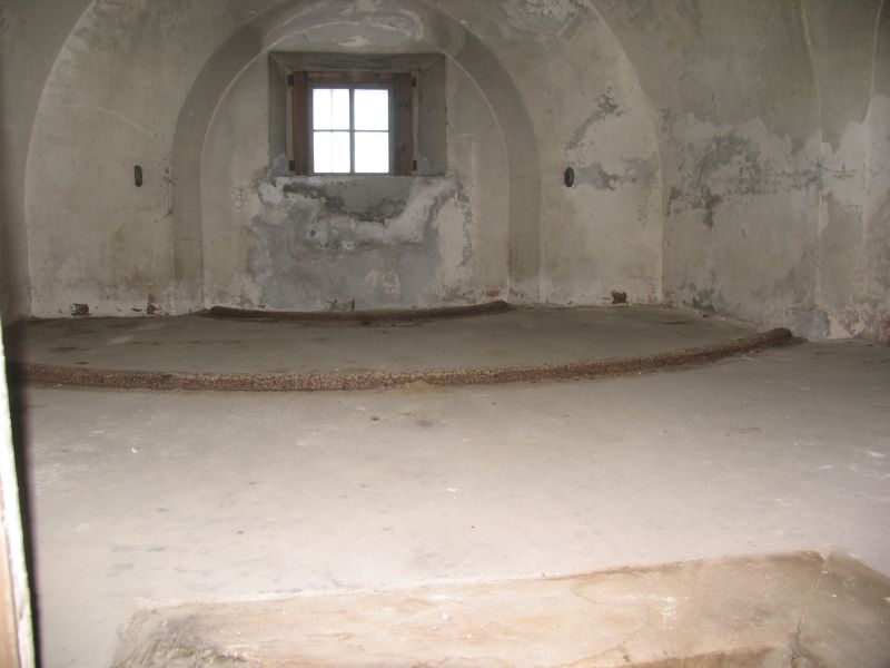 Prøvestensfortet (Prøvestenen), skytsrum